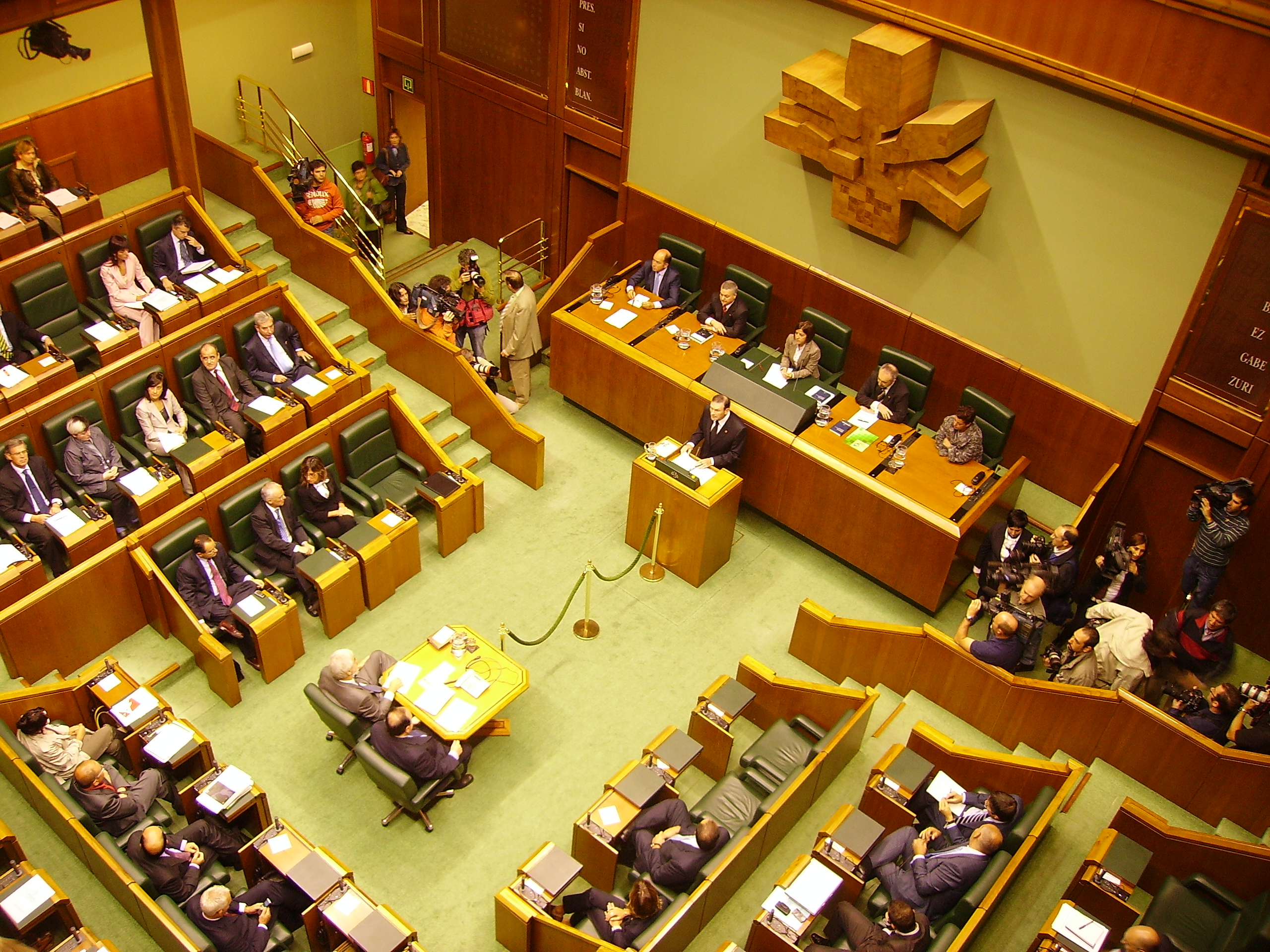 Ibarretxe lehendakari jaunaren berbaldia Gasteizko Legebiltzarraren aurrean, Arabar herrialdean, Euskal Herrian. Atzekaldean Nestor Basterretxeak eginiko egurrezko eskultura.